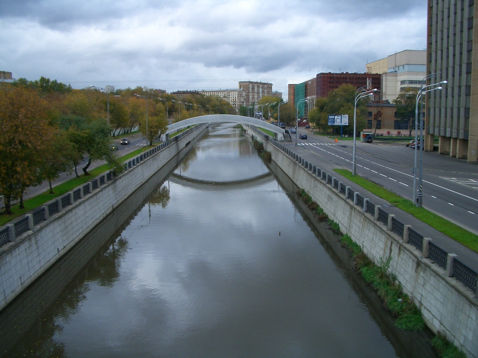 Beschreibung: Der Fluss Jausa im Moskauer Stadtgebiet Река Яуза на территории города Москвы. Вид вверх по течению с Электрозаводского моста. Слева, вдоль Русаковской набережной, будет построена громада "Солнечной Арки", но пока там видны одни деревья. Справа только-только начали обшивать сайдингом тёмные корпуса МЭЛЗа. Пешеходный мост (он же теплотрасса) прямо по курсу - безымянный. Autor: Lewa.